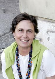 Mussi Bollini